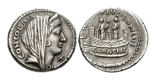 L. Mussidius Longus. 42 BC. AR Denarius (17mm, 4.04 g, 1h). Rome mint.Veiled and diademed bust of Concordia right; star to lower rightTwo statues of Venus Cloacina on platform with balustrade of the shrine of Venus Cloacina.Crawford 494/42b; CRI 188a; Sydenham 1093a; Mussidia 6.